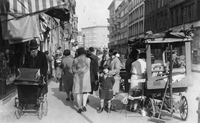 Berlin, im Scheunenviertel, Straßenhandel ADN-ZB/Archiv Berlin 1933: Straßenszene in der Grenadierstraße (heute Almstadtstraße) im sogenannten "Scheunenviertel". Aufn.: P. Buch [Berlin, Grenadierstraße (heute Almstadtstraße).- Verkauf von Brot und Schrippen von einem Holzkarren]